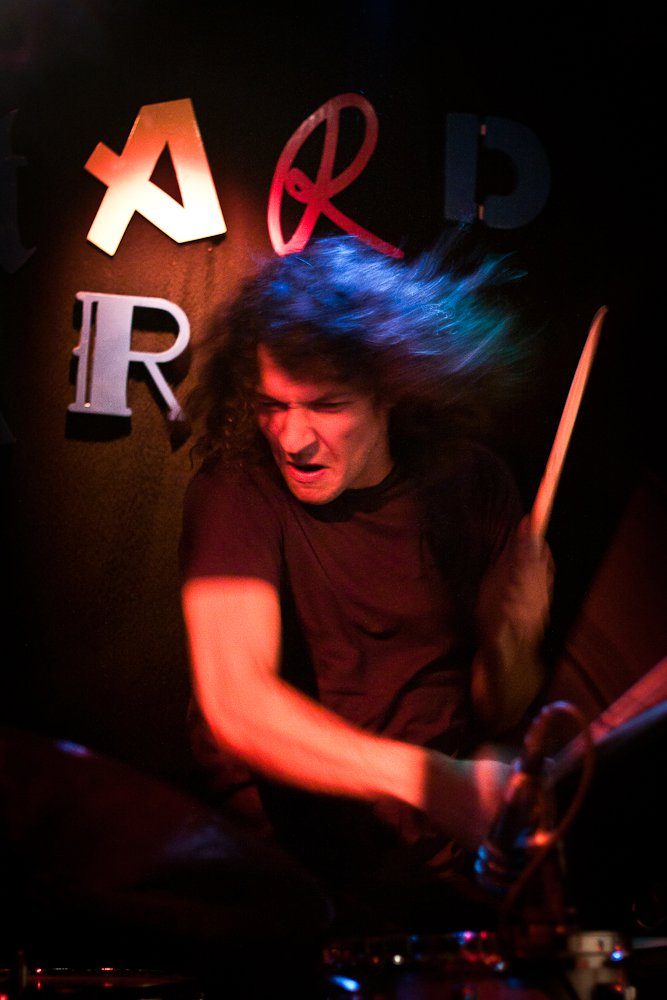 Aleksander i fri flyt på Bastard i Tromsø